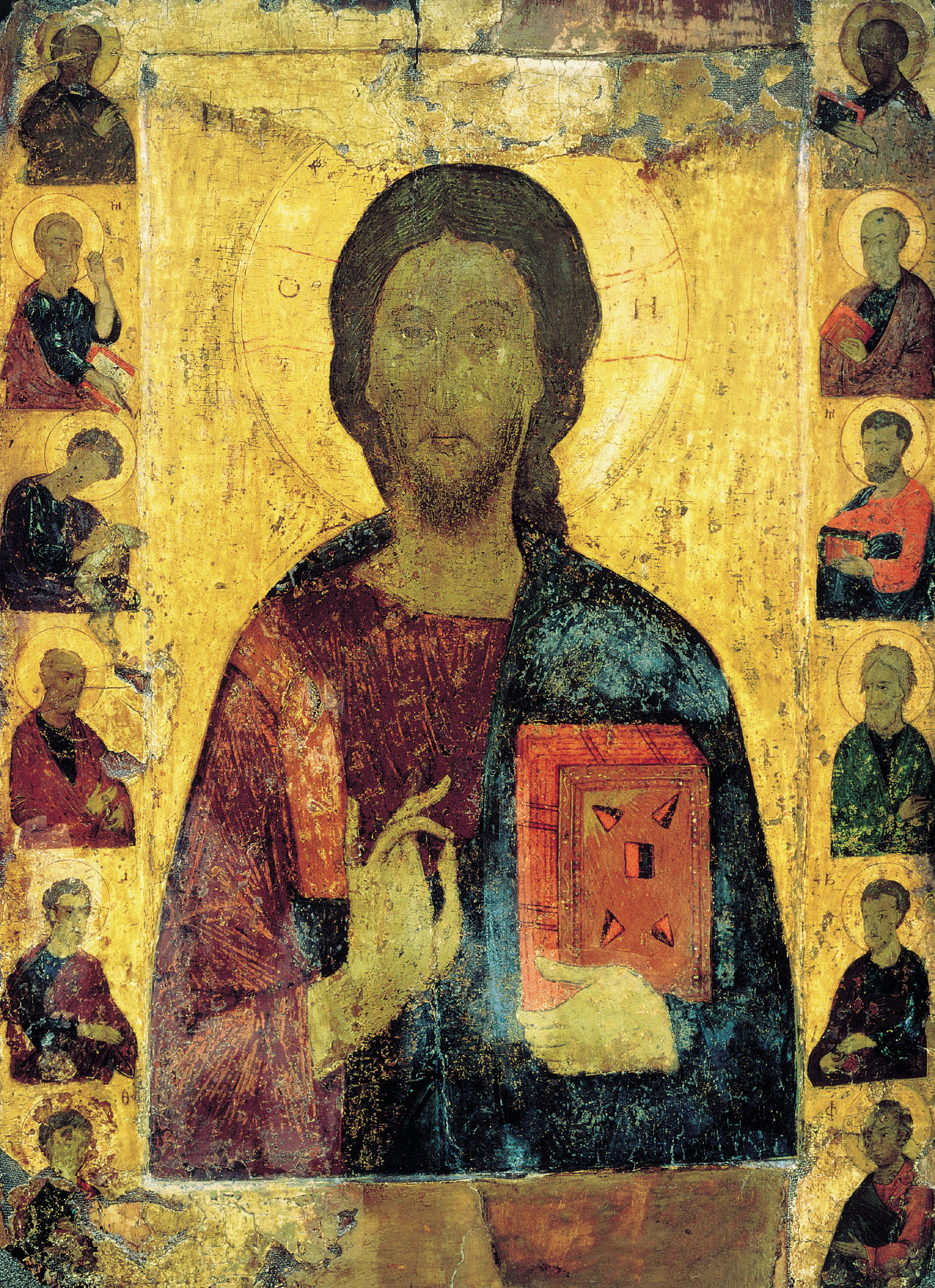 Спас с апостолами. Первая половина XIV в. 92×64 см. Государственная Третьяковская Галерея, Москва, Россия. Инв. ДР 52. Поступила в Третьяковскую галерею из Ярославского областного художественного музея, куда попала из разрушенной усадьбы гр. Мусиных-Пушкиных Иловна, в 50 км от Мологи. Предположительно, написана в Ростове.